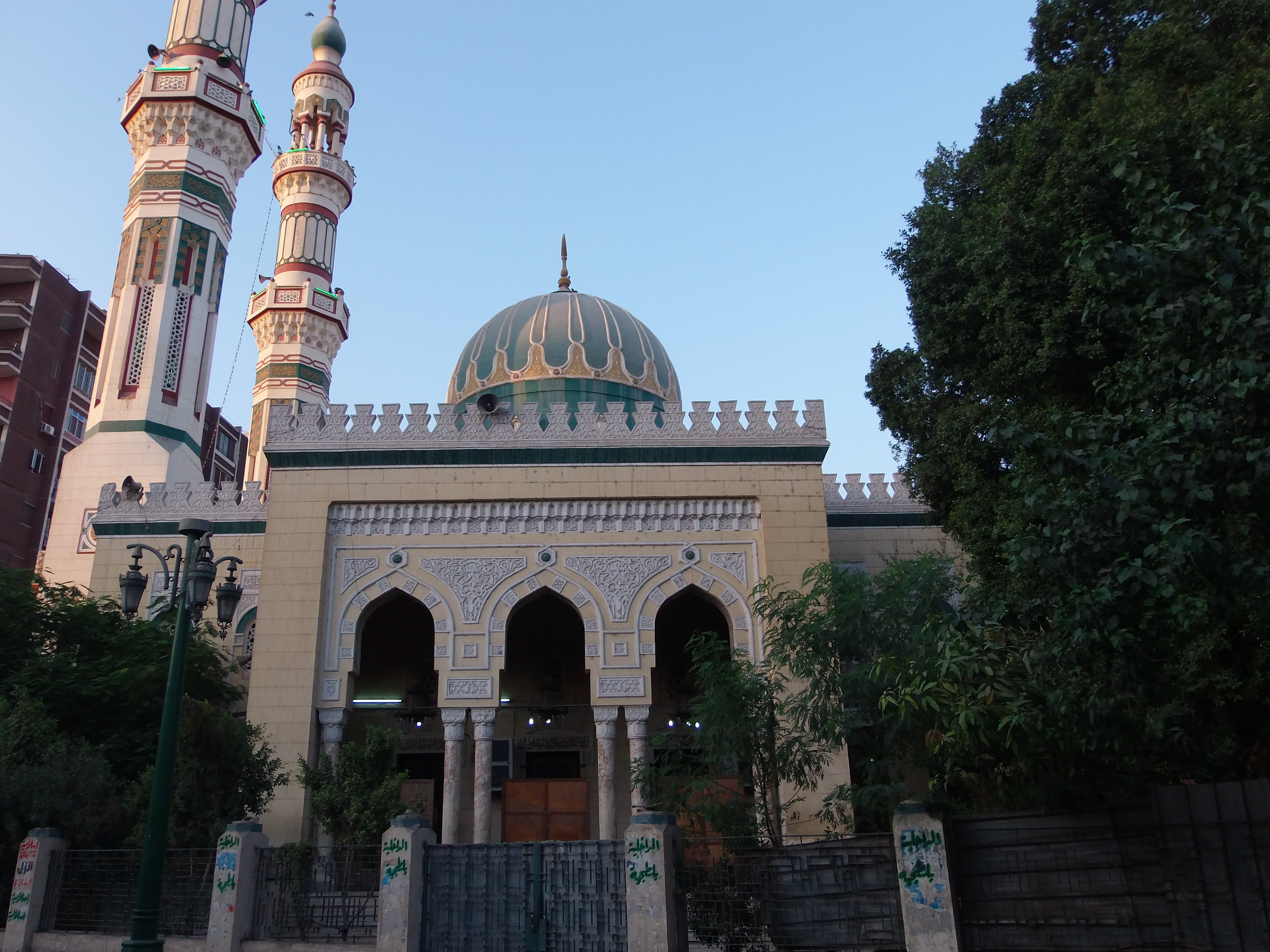 Nasser Mosque مسجد ناصر